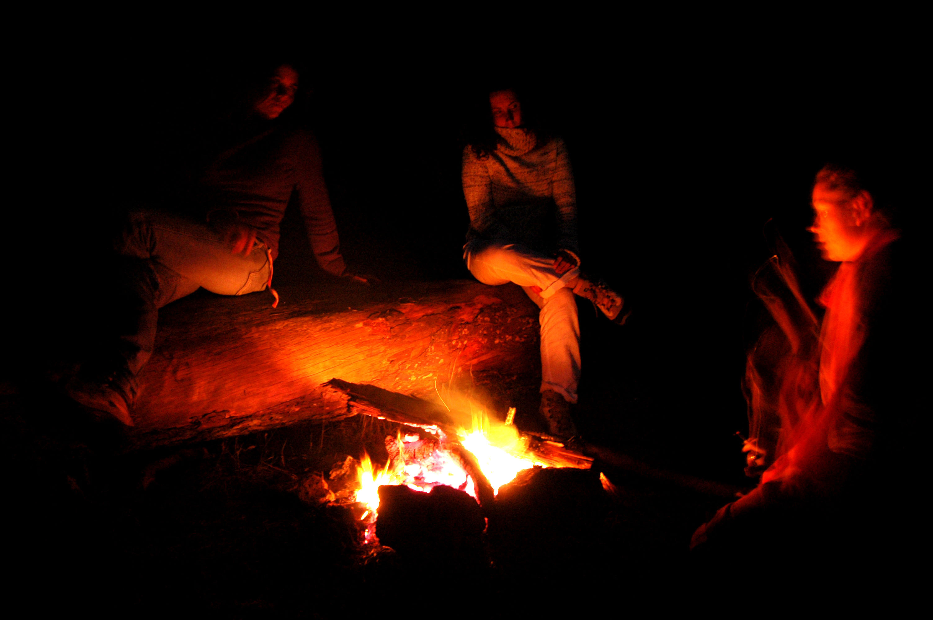 Autour du feu (Bourg Murat, Ile de la Réunion)